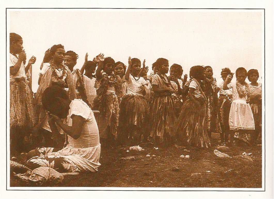 Enfants futuniens de Sigave, sur l'île de Futuna (Wallis-et-Futuna), en 1964 lors du passage du navire français La Lorientaise qui faisait la tournée des territoires français du Pacifique